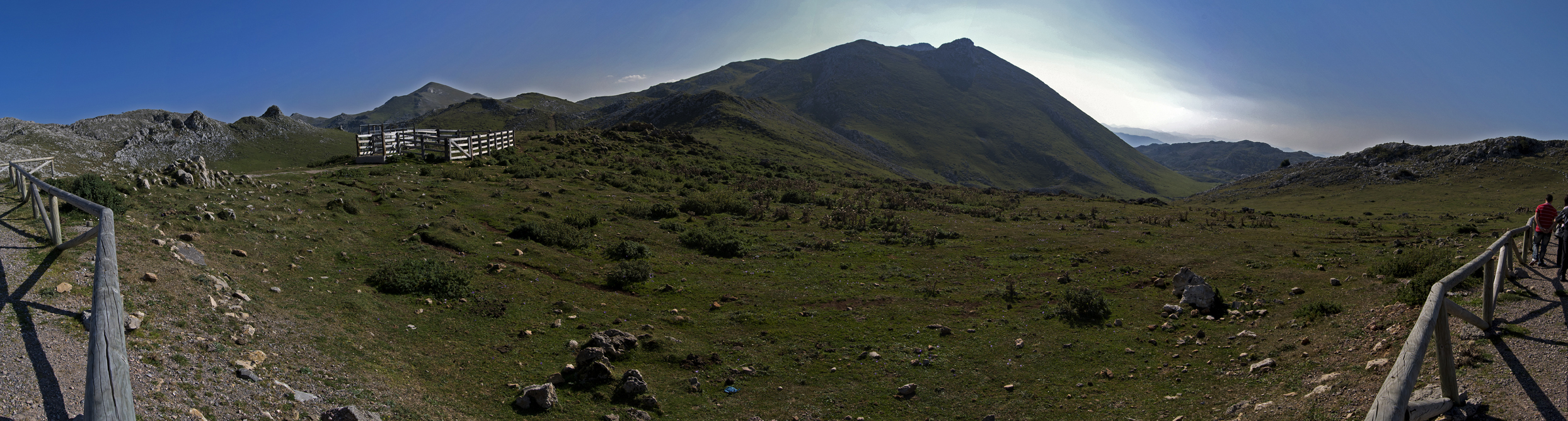 La Sierra del Aramo, en la zona centro de Asturias, vista desde el famoso alto visitado por la Vuelta Ciclista a España en varias ocasiones.